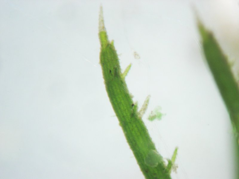 Feine Armleuchteralge Chara delicatula, Astspitze , Müritz-Gebiet